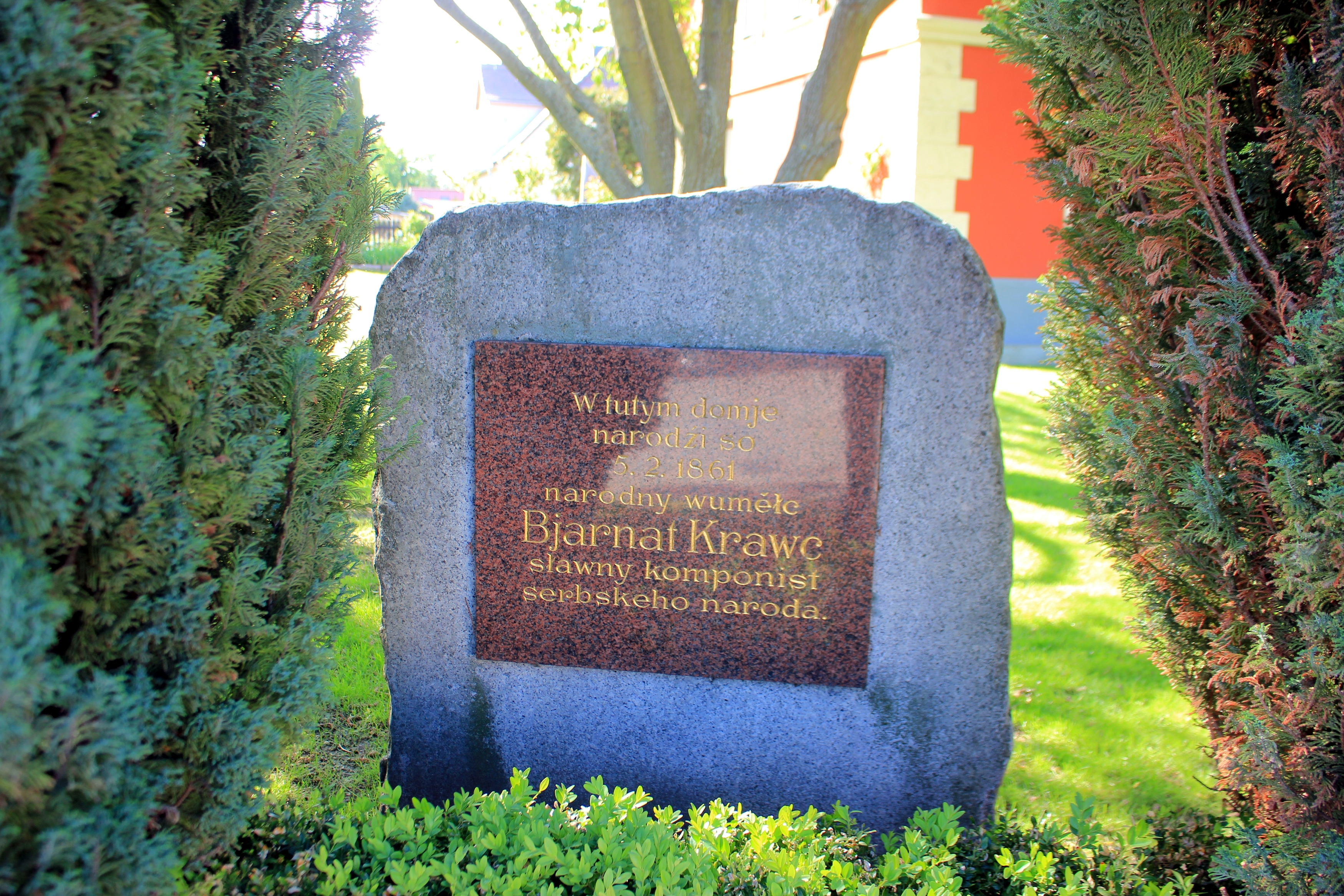 Hornjoserbsce: Wopomnjenska tafla při ródnym domje Bjarnata Krawca w Jitru